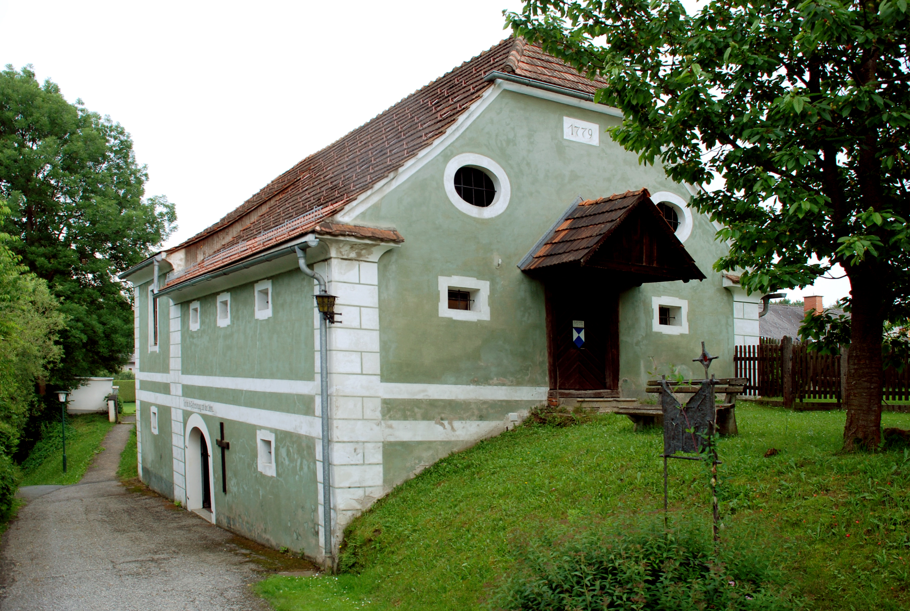 St Peter im Sulmtal, Steiermark, Österreich: Kellerstöckl